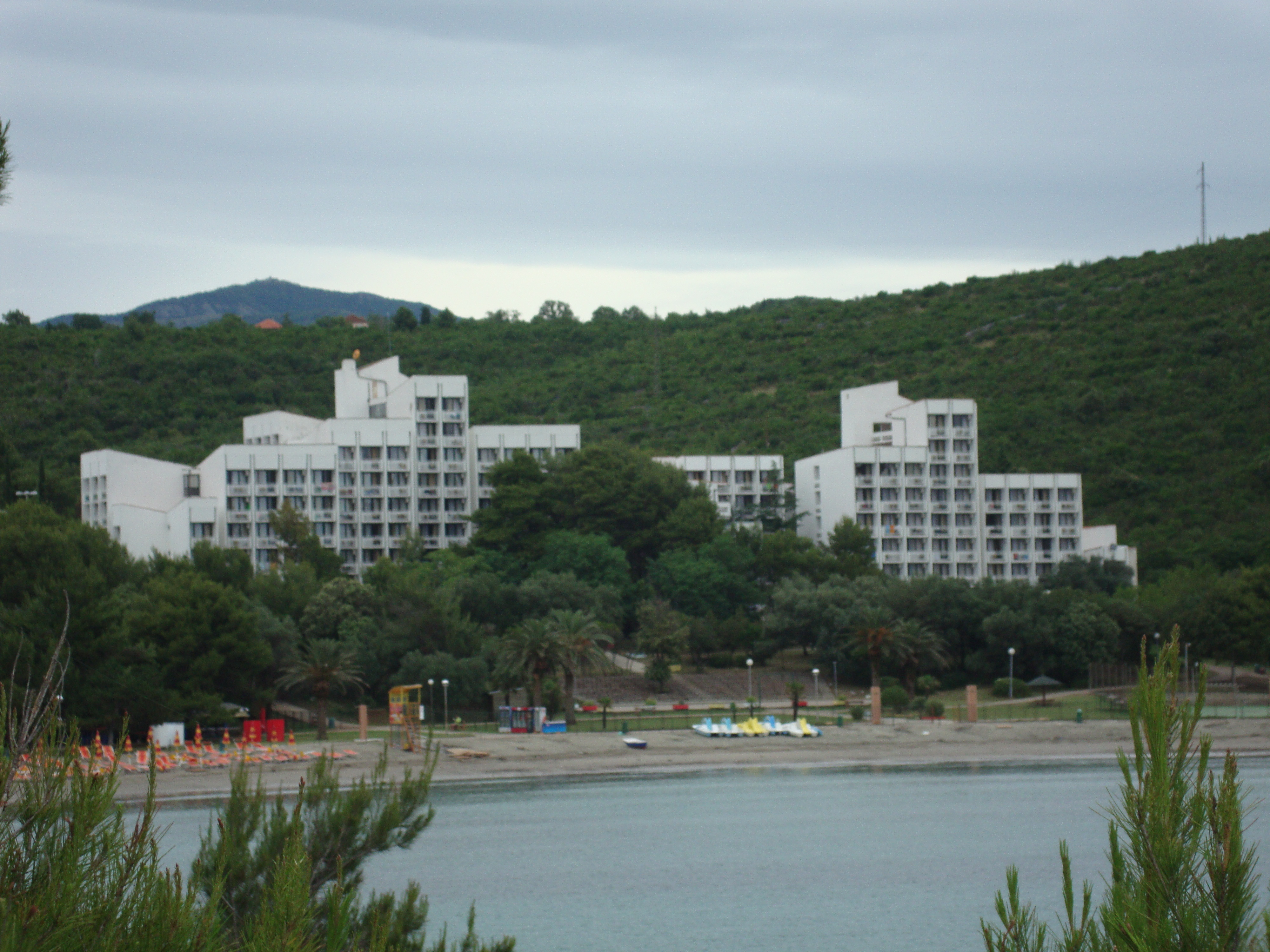 Hotel Plavi horizonti, Radovici